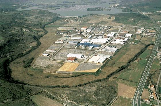 Goiaingo industrialdea eta Urrunagako urtegia.